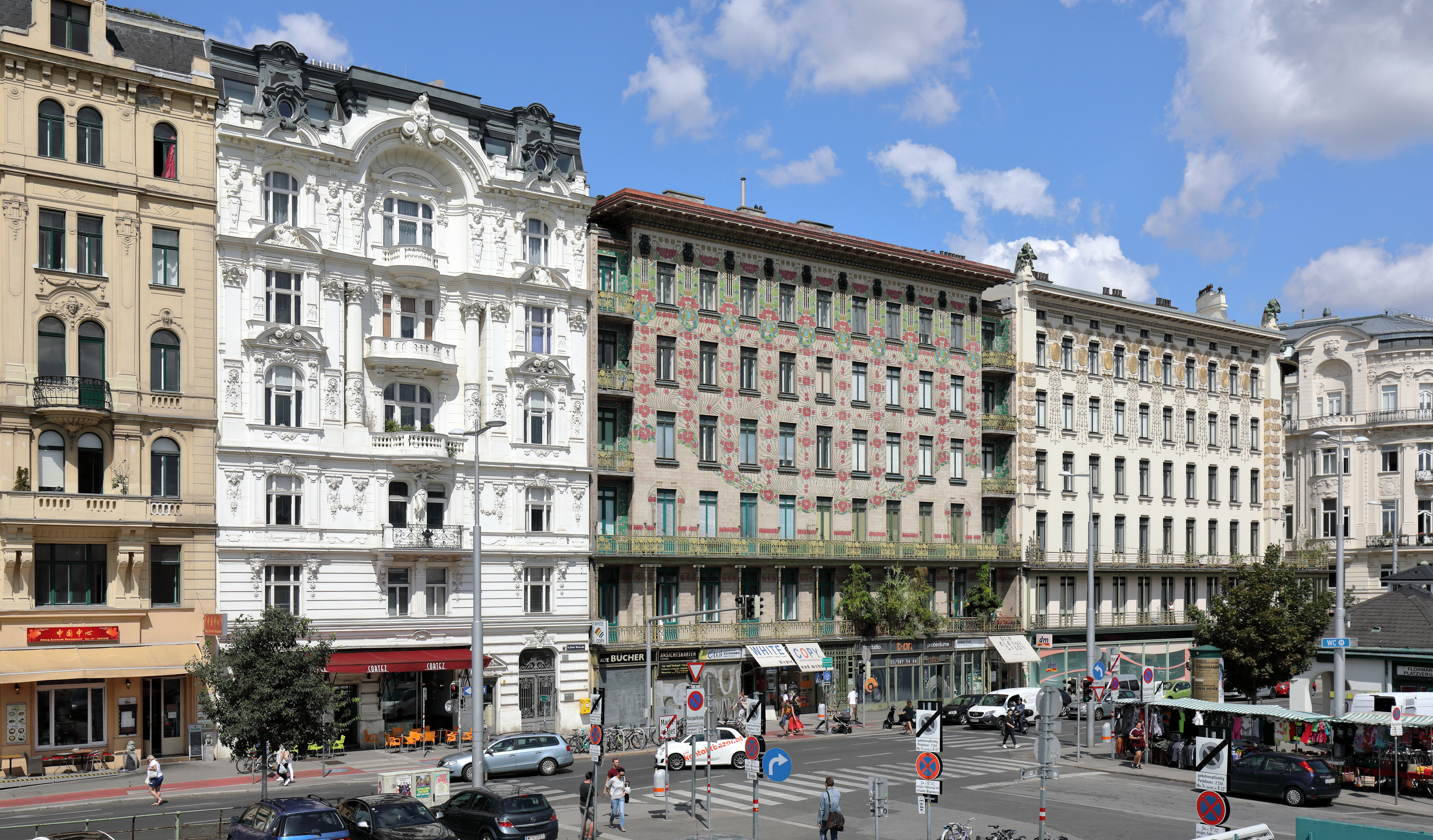 Die Linke Wienzeile auf der Höhe der Kettenbrücke(ngasse) im 6. Wiener Gemeindebezirk Mariahilf mit dem „Majolikahaus“ von Otto Wagner im Bildzentrum.Ganz links Haus Nr.44, Wohnhaus des Heldentenors Hermann Winkelmann (1849–1912), anschließend Haus Nr. 42, ein reich gegliedertes historistisches Wohn- und Geschäftshaus, das von 1896 bis 1897 nach Plänen von Rudolf Kmunke errichtet wurde. Im Anschluss Haus Nr. 40, auch „Majolikahaus“ bezeichnet, ein Miethaus, das von Otto Wagner 1898/1899 errichtet wurde und das Eckhaus „Köstlergasse“ mit vergoldetem secessionistischem Dekor, wiederum ein von Otto Wagner 1898/1899 errichtetes Haus und ganz rechts Haus Nr. 36, ein monumentales späthistoristisches Mietpalais, erbaut 1897 nach Plänen von Franz Ritter von Neumann. Rechts im Vordergrund die Kettenbrücke und der Naschmarkt.